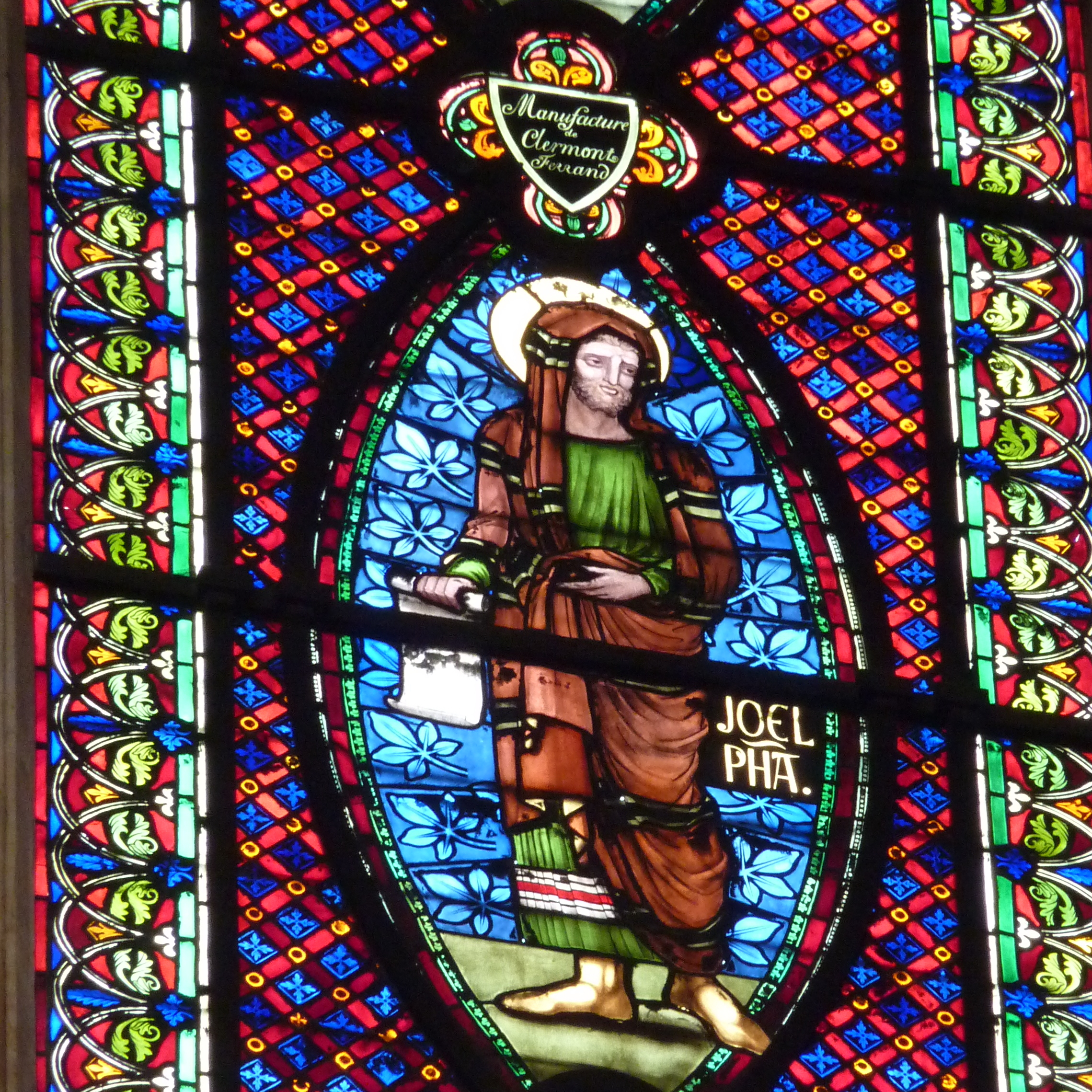 Bleiglasfenster (Ausschnitt) in der katholischen Pfarrkirche Saint-Germain-l'Auxerrois in Paris, Darstellung: Prophet Joel, Fenster der Glasmalerei Étienne Thévenot in Clermont-Ferrand (1839)